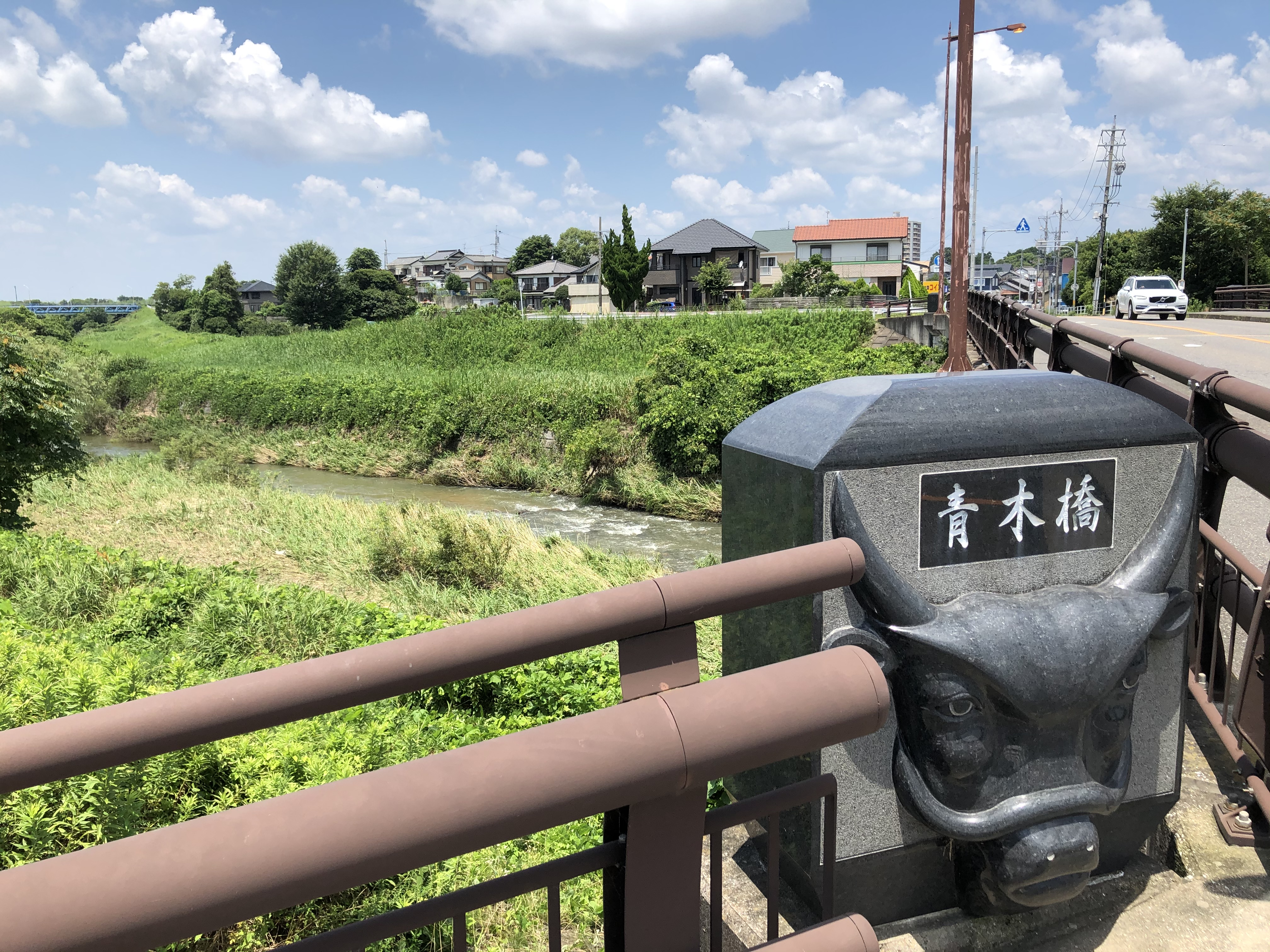 青木川に架かる青木橋